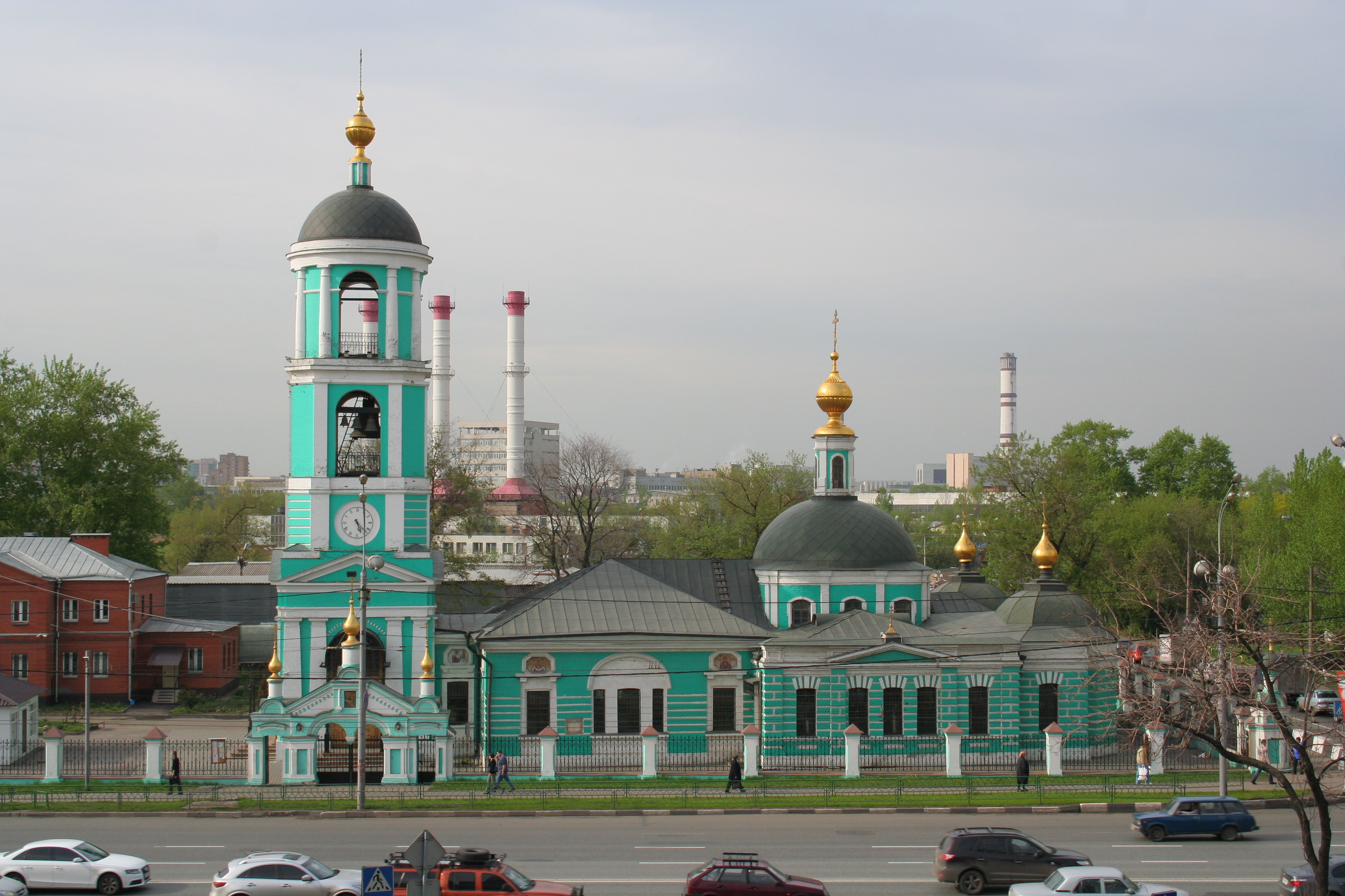 Kirche der Heiligen Dreifaltigkeit zu Karatscharowo in Moskau